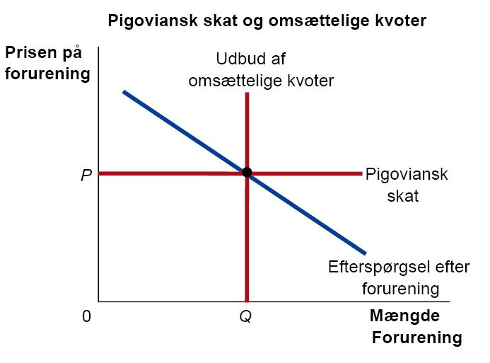 I visse tilfælde er der ikke forskel på at indføre en pigoviansk skat og udbyde omsættelige kvoter. De to adskiller sig dog ved, at man ved en pigoviansk skat fastsætter en pris og der udfra kommer en mængde, mens man med omsættelige kvoter fastsætter en mængde og der herudfra kommer en pris.